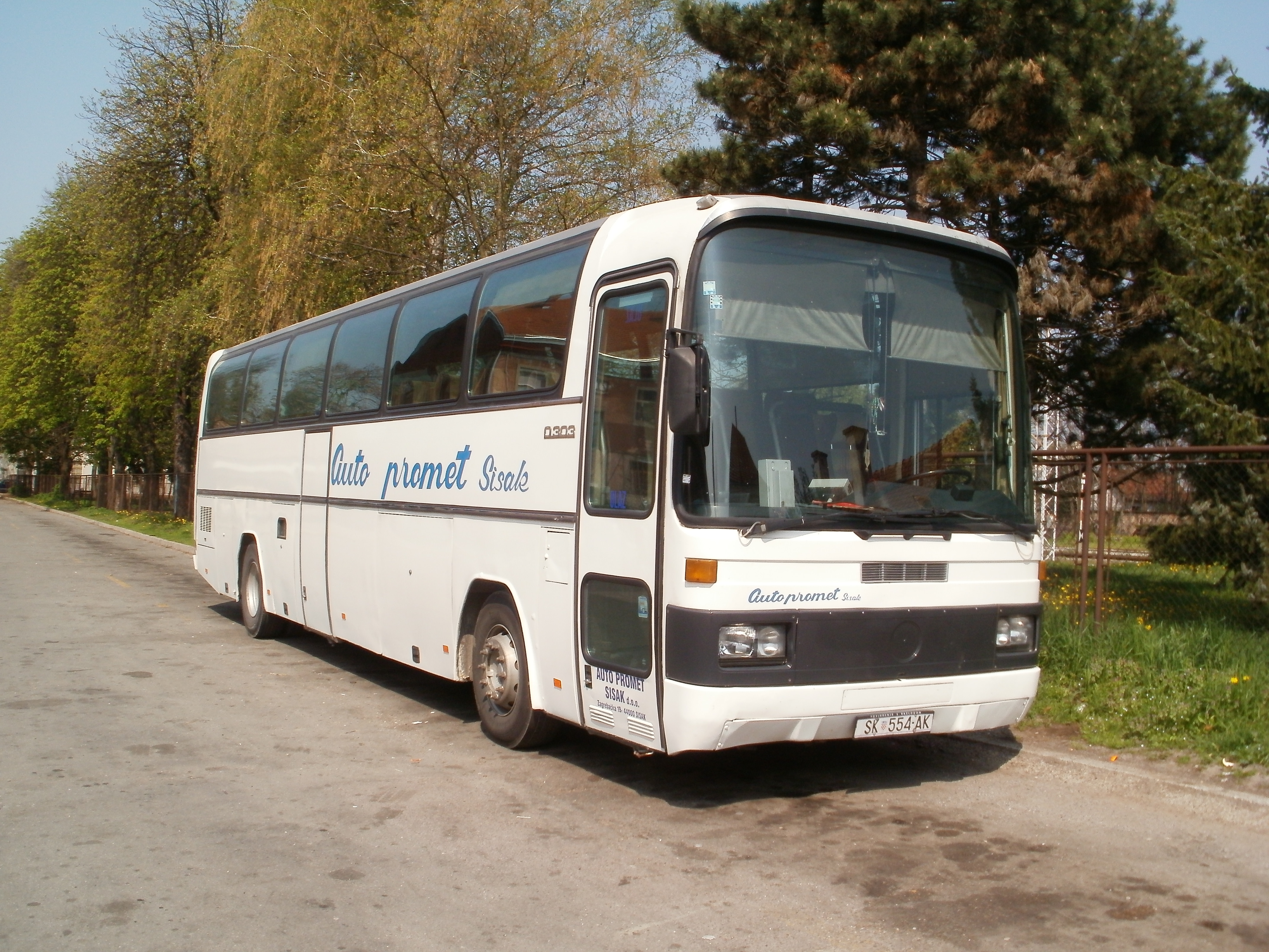 Autobus Mercedes-Benz u vlasništvu Auto-prometa iz Siska